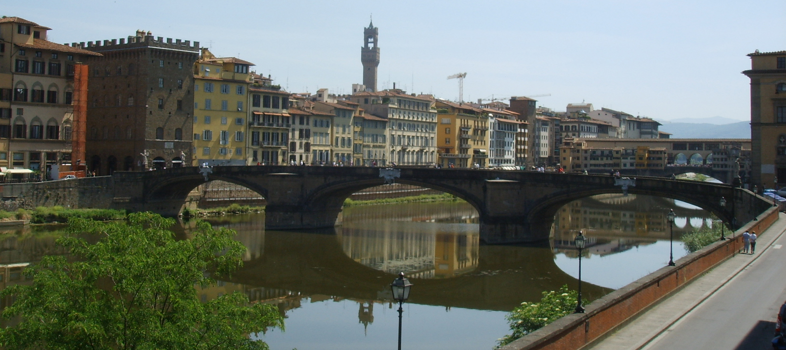 Ponte Santa Trinita (Florence). View from Palazzo Bardi Guicciardini's terrace.